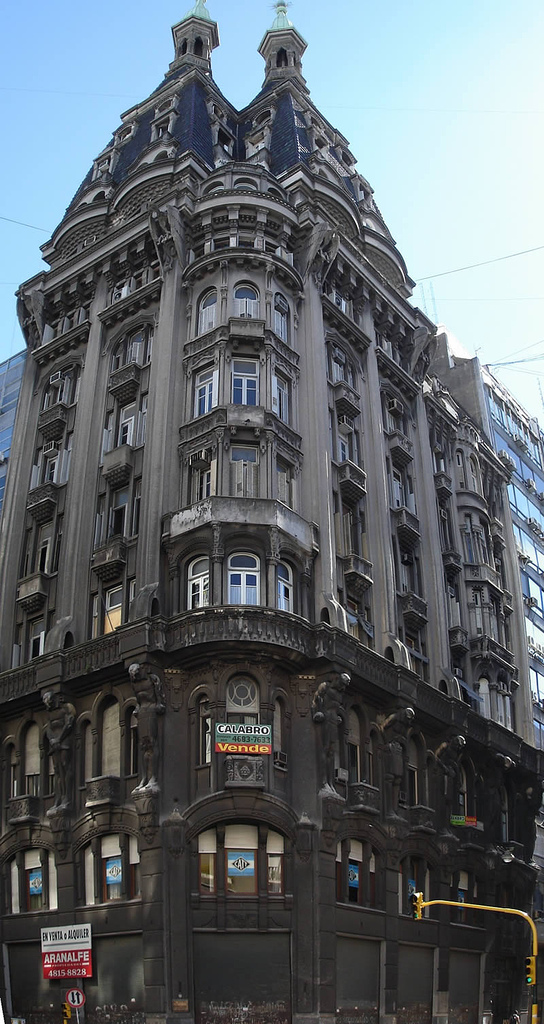 Edificio Otto Wulf, Avenida Belgrano 601, barrio de Monserrat, Buenos Aires, Argentina.